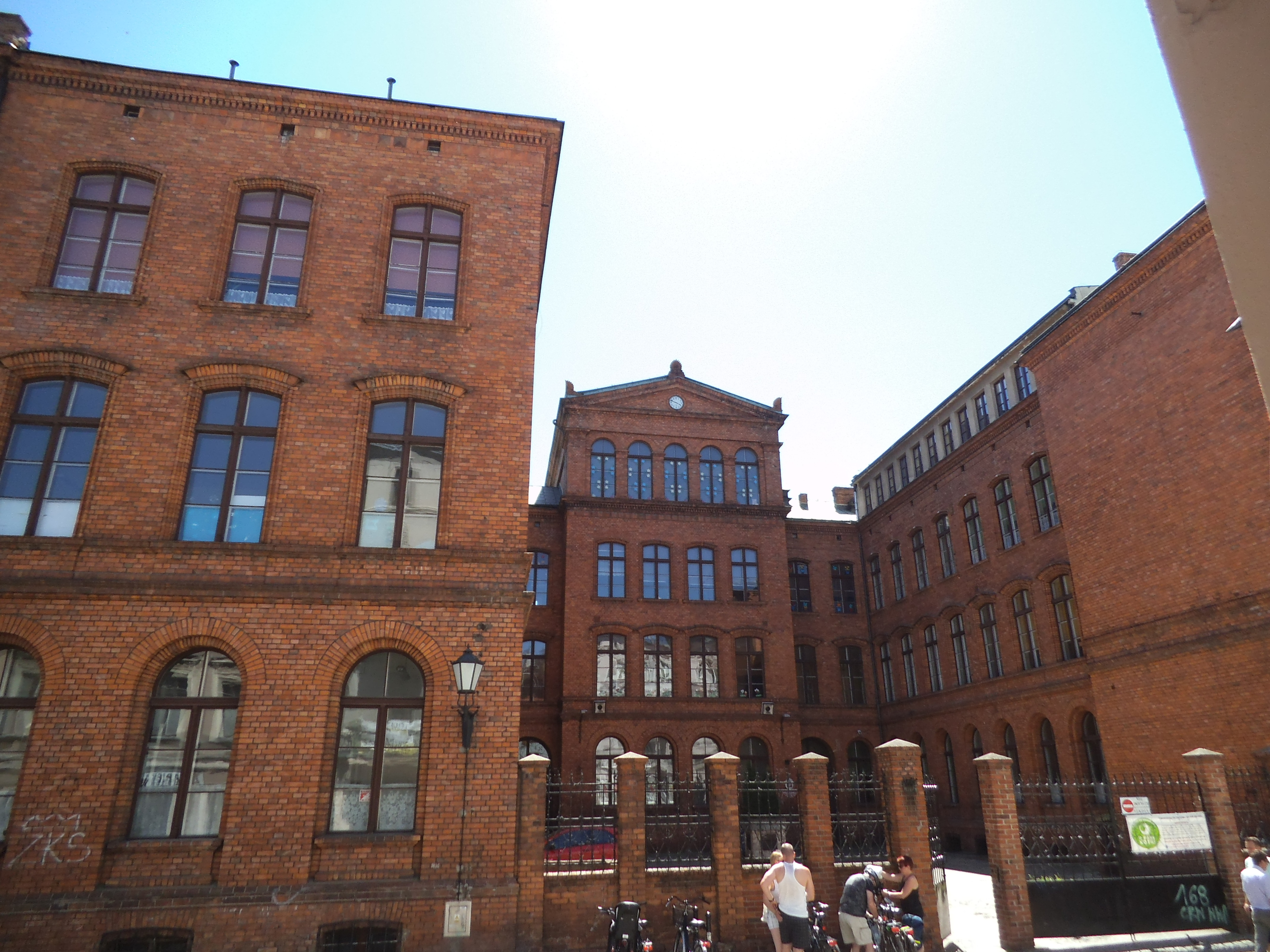 Szkoła Podstawowa Nr 1 w Toruniu